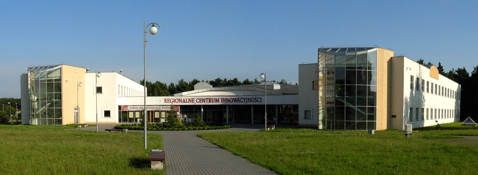 Regionalne Centrum Innowacyjności Uniwersytetu Technologiczno-Przyrodniczego w Bydgoszczy